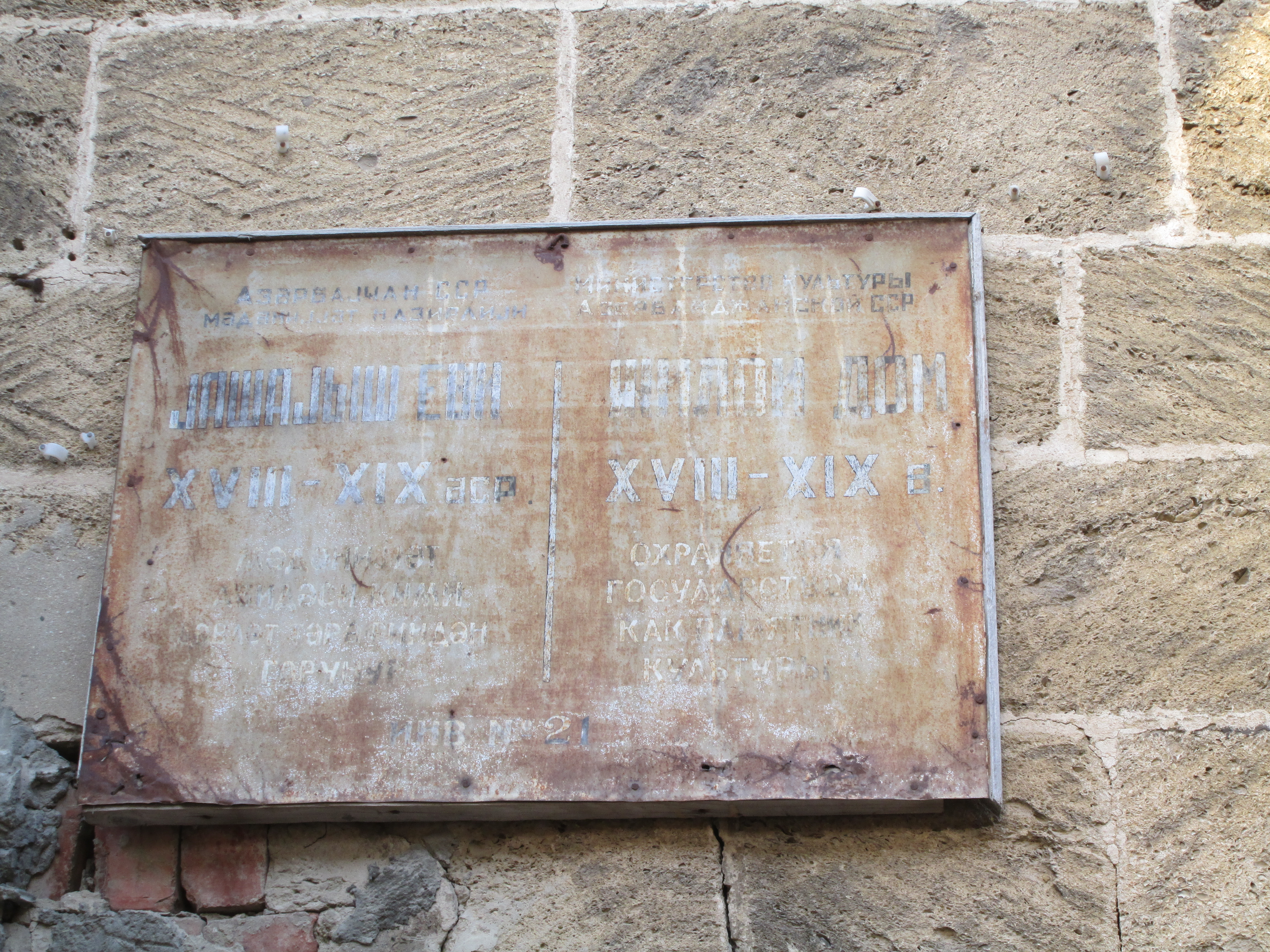 Qəsr 32 abidə məlumat lövhəsi az ru